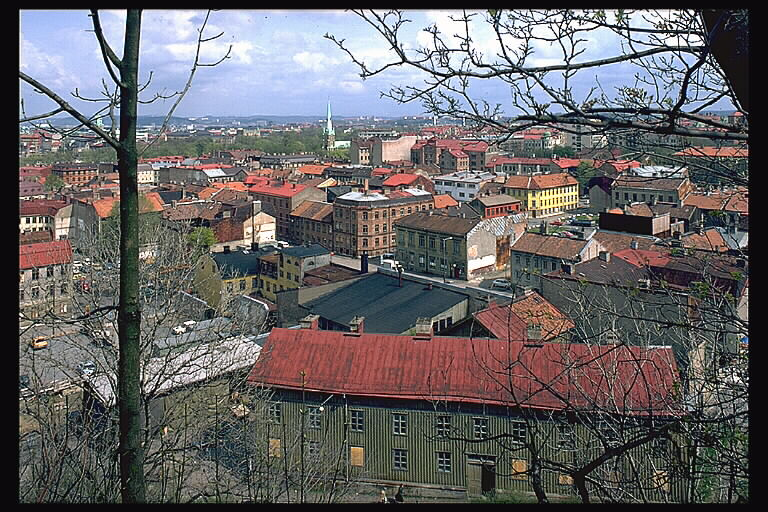 Haga från Skansberget. Hagakyrkans torn syns i bakgrunden. Bilden troligen från slutet av 1970-talet. Motiv: Göteborg Nyckelord: Riksintressen Kategori: Stadsmiljö Haga från Skansberget. Hagakyrkans torn syns i bakgrunden. Bilden troligen från slutet av 1970-talet.